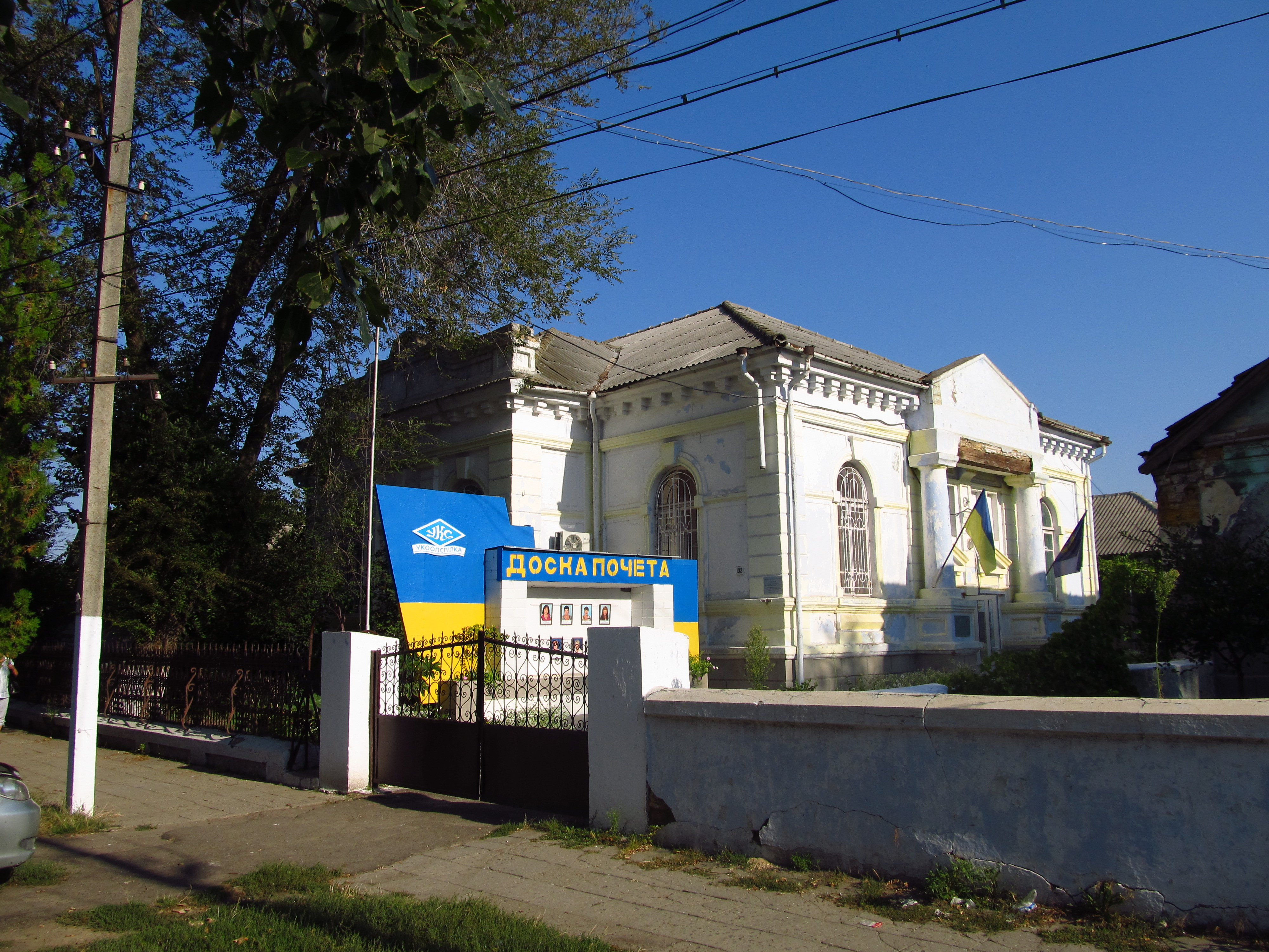 Особняк кінця ХІХ ст в якому розташована райспожвспілка, Арциз.